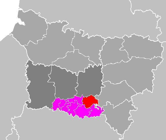 Maps of arrondissements and cantons of France: Département de l'Oise